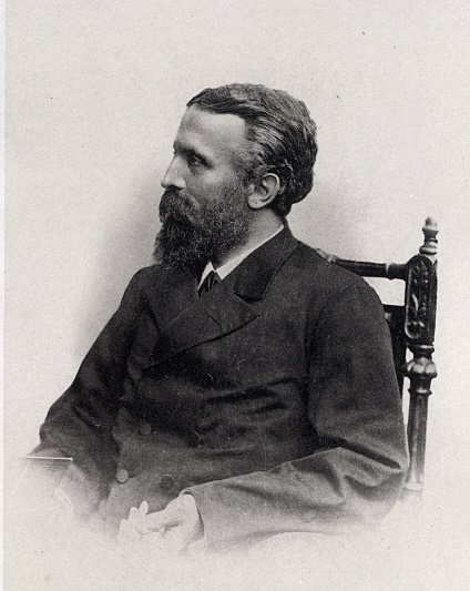 Professor Richard Wülker (1865-1910), Universität Leipzig